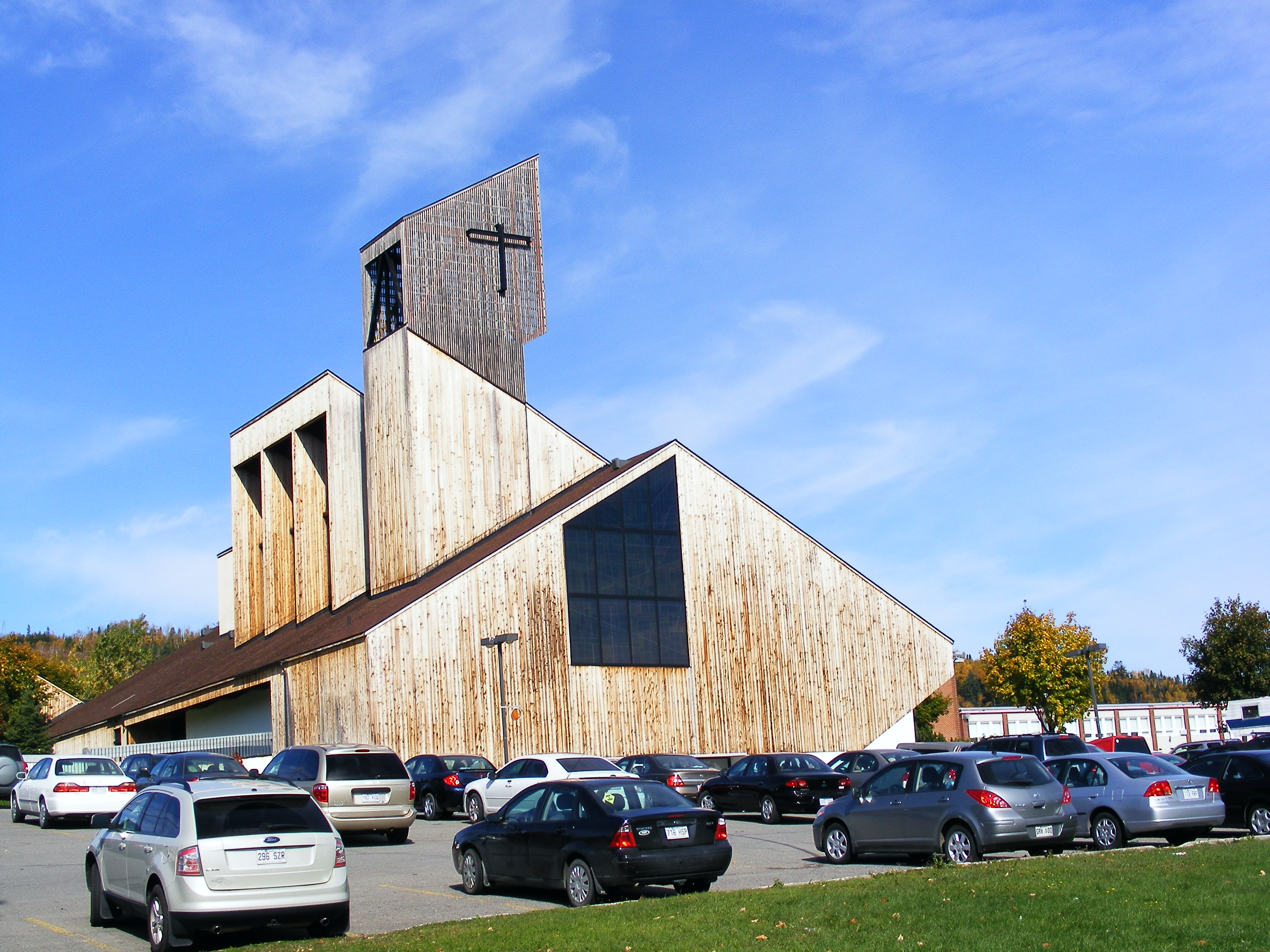 Cathédrale catholique de Gaspé